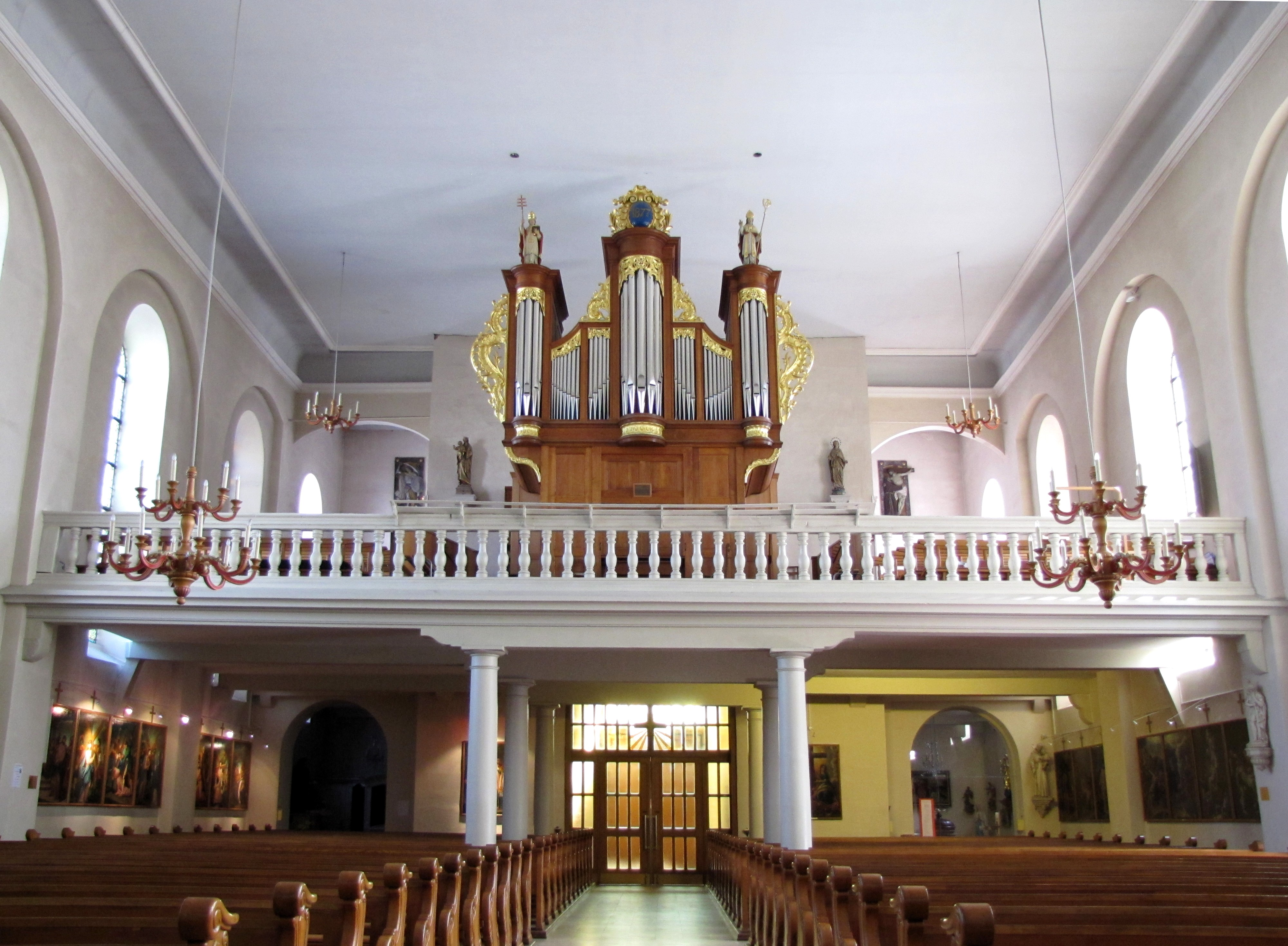 Alsace, Bas-Rhin, Weyersheim, Église Saint-Michel (PA00085235, IA00119652): Vue intérieure de la nef vers la tribune d'orgue.